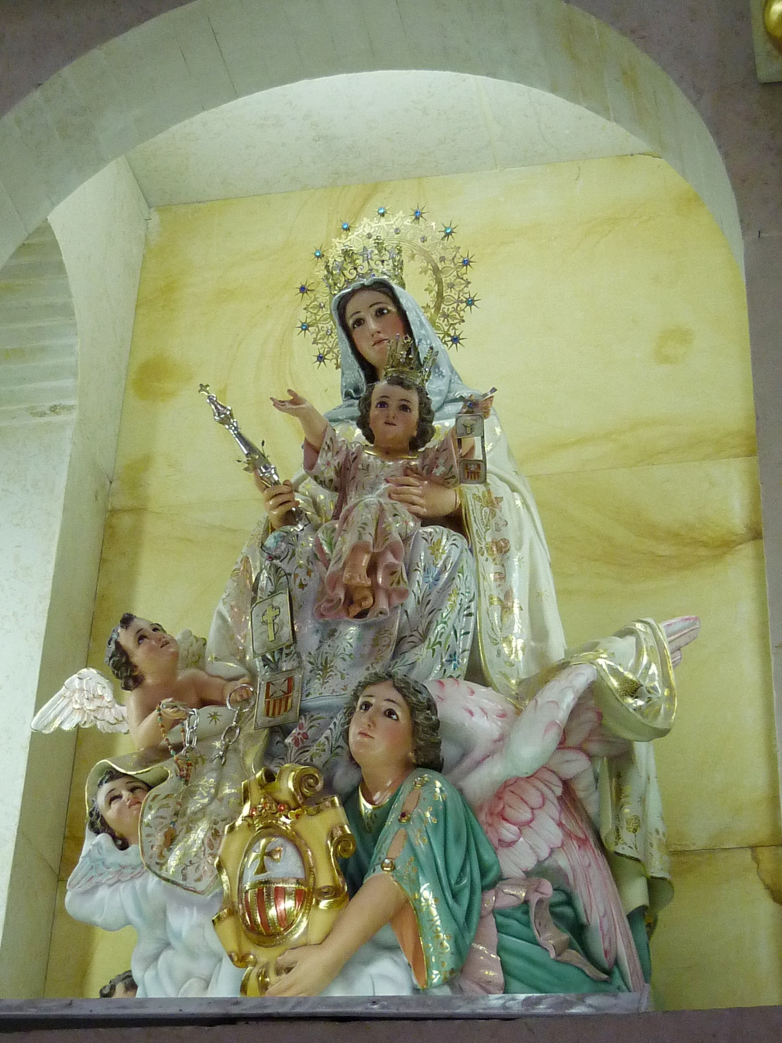 Nuestra Señora de las Mercedes patrona de Jericó